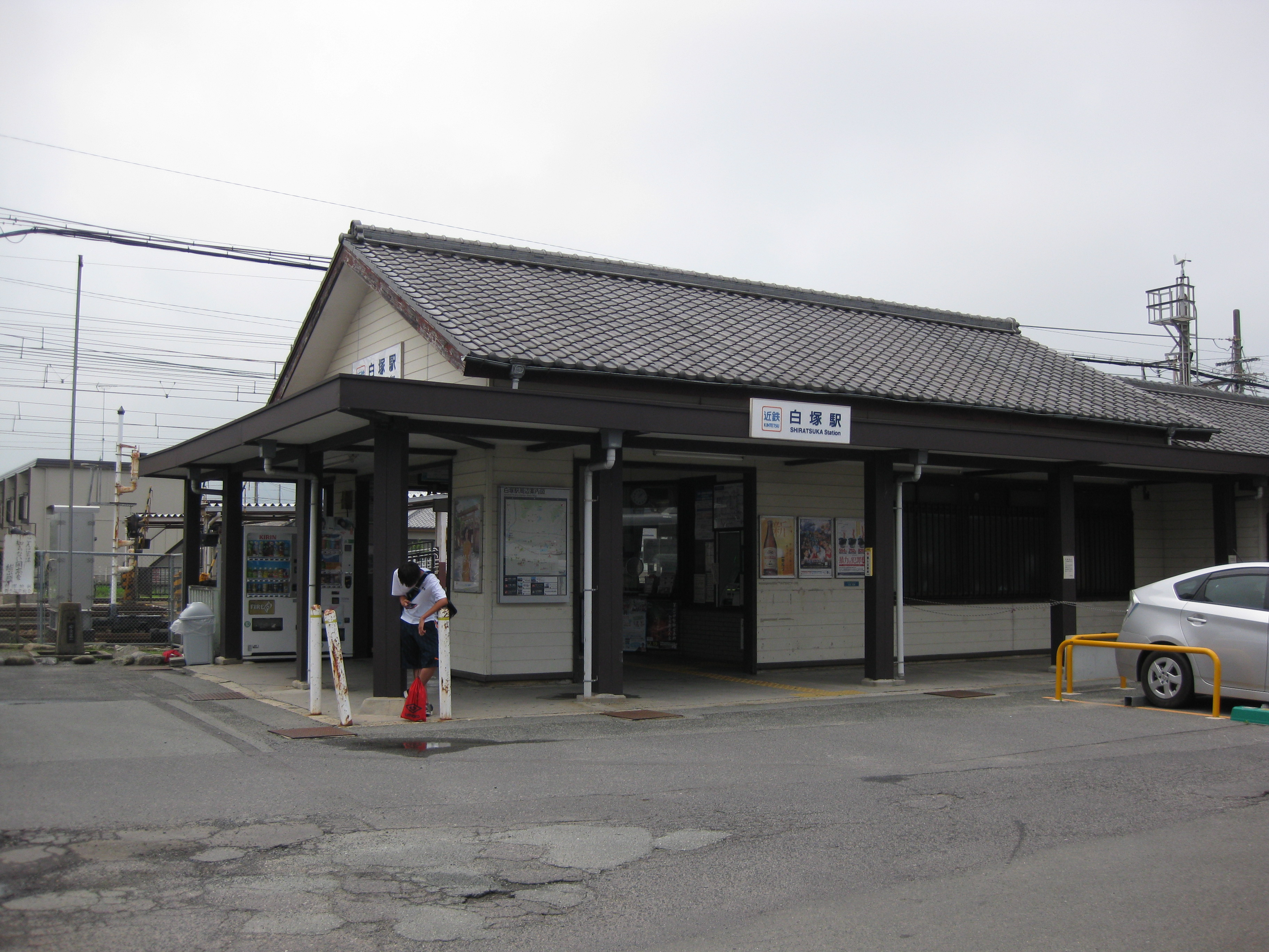 白塚駅駅舎